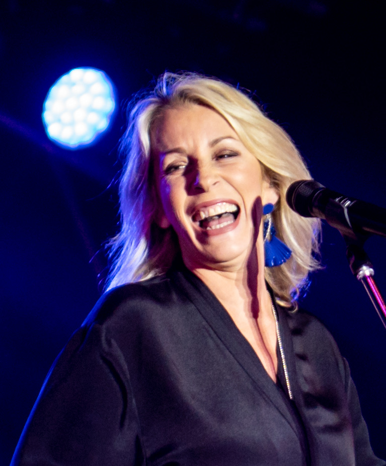 BanaRamaAmpthill290618-26